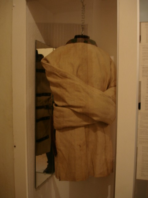 jail stasi